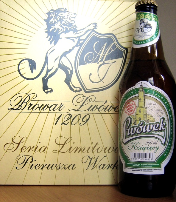 Lwówek Książęcy z Browaru Lwówek Śląski. Uwarzone 20 maja 2010 jako pierwsza warka po reaktywowaniu browaru przez spółkę Ciechan